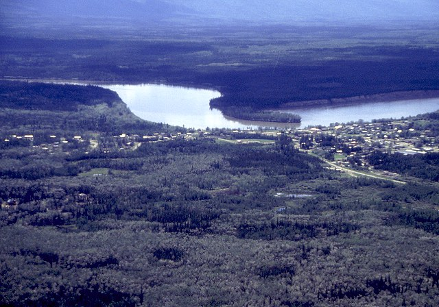 Die kanadische Ortschaft Mayo mit dem Stewart River aus der Luft